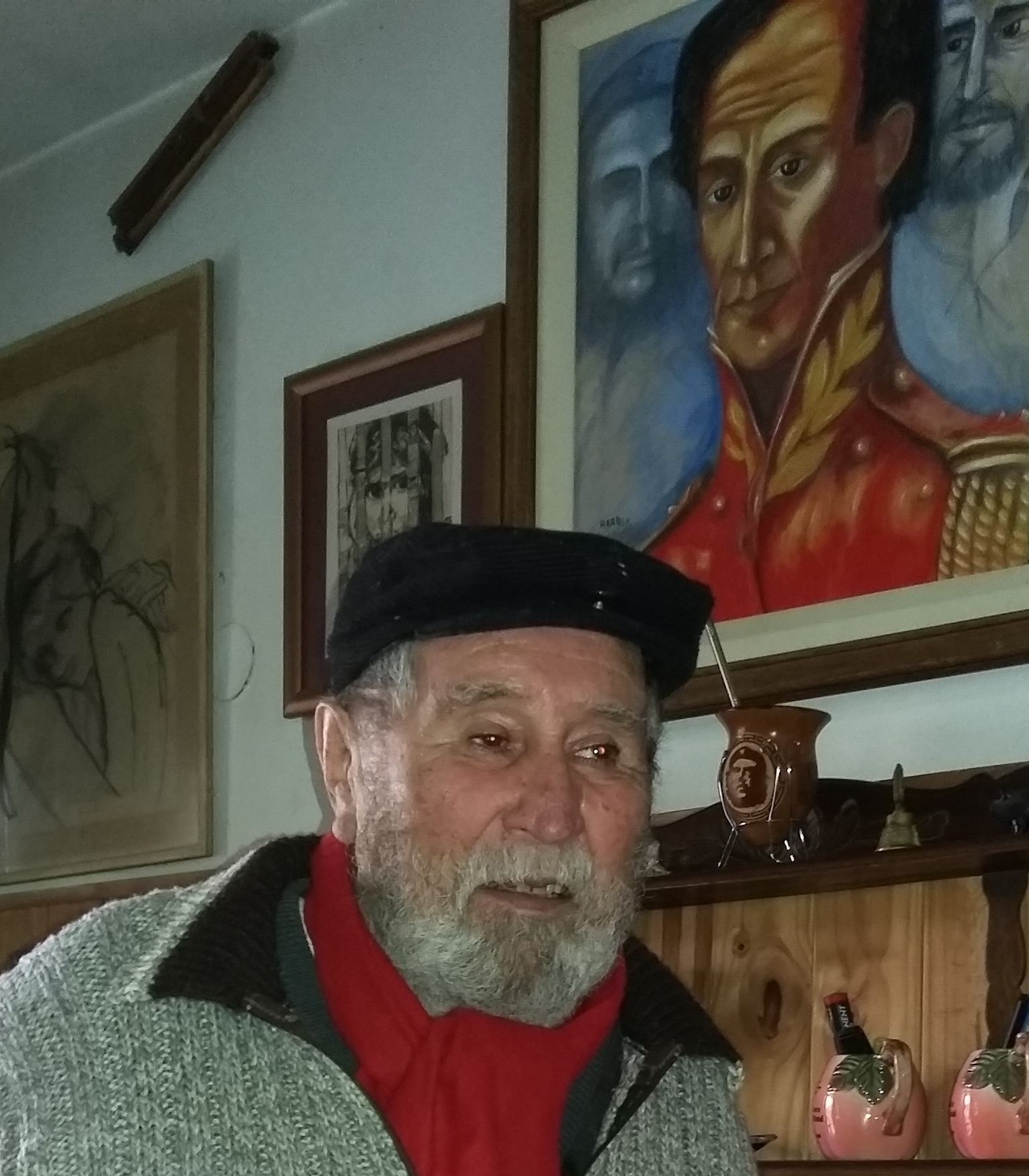 Oscar Sosa Ríos